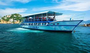 embarcacion de fondo de cristal para ir a la roqueta